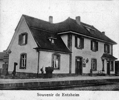 L'ancienne gare d'Entzheim dans les années 1920.